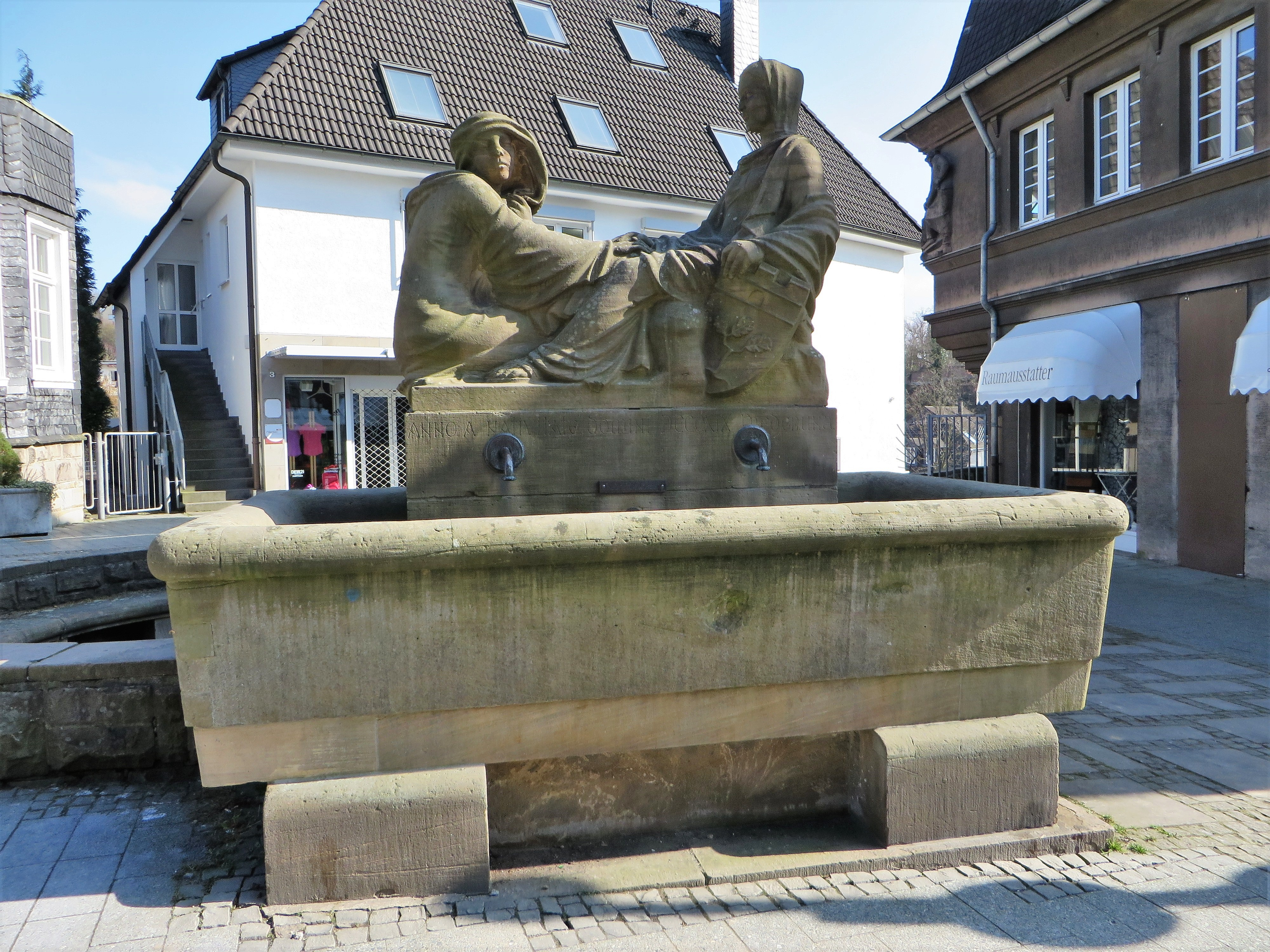 Denkmalgeschützter Frederuna-Bunnen in Herdecke, Hauptstraße (Höhe Haus-Nr. 54). Erschaffen 1927 von dem Bildhauer Friedrich Bagdons. Errichtet zur Erinnerung an die gleichnamige Gründerin des Stifts Herdecke; zu ihren Füßen kniend die erste Äbtissin Alswedis. Der von Frederuna gehaltene Schild mit Eiche dokumentiert eine Legende zur Standortwahl der Stiftsgründung. This is a photograph of an architectural monument.